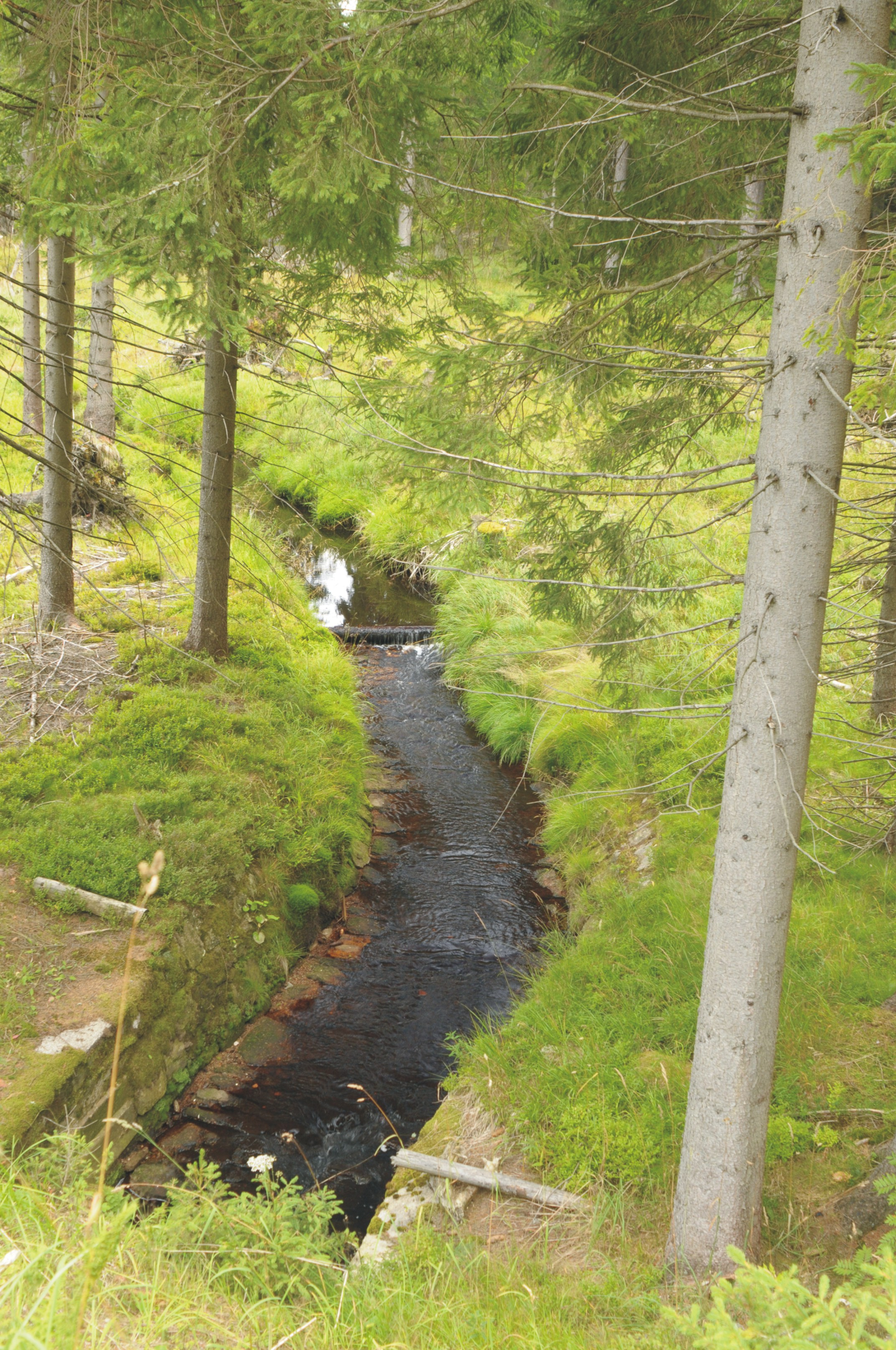 Wilzsch, im Naturschutzgebiet Großer Kranichsee kurz vor der Talsperre Weiterswiese (Sachsen, Deutschland)